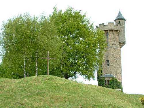 La tour de Masseret